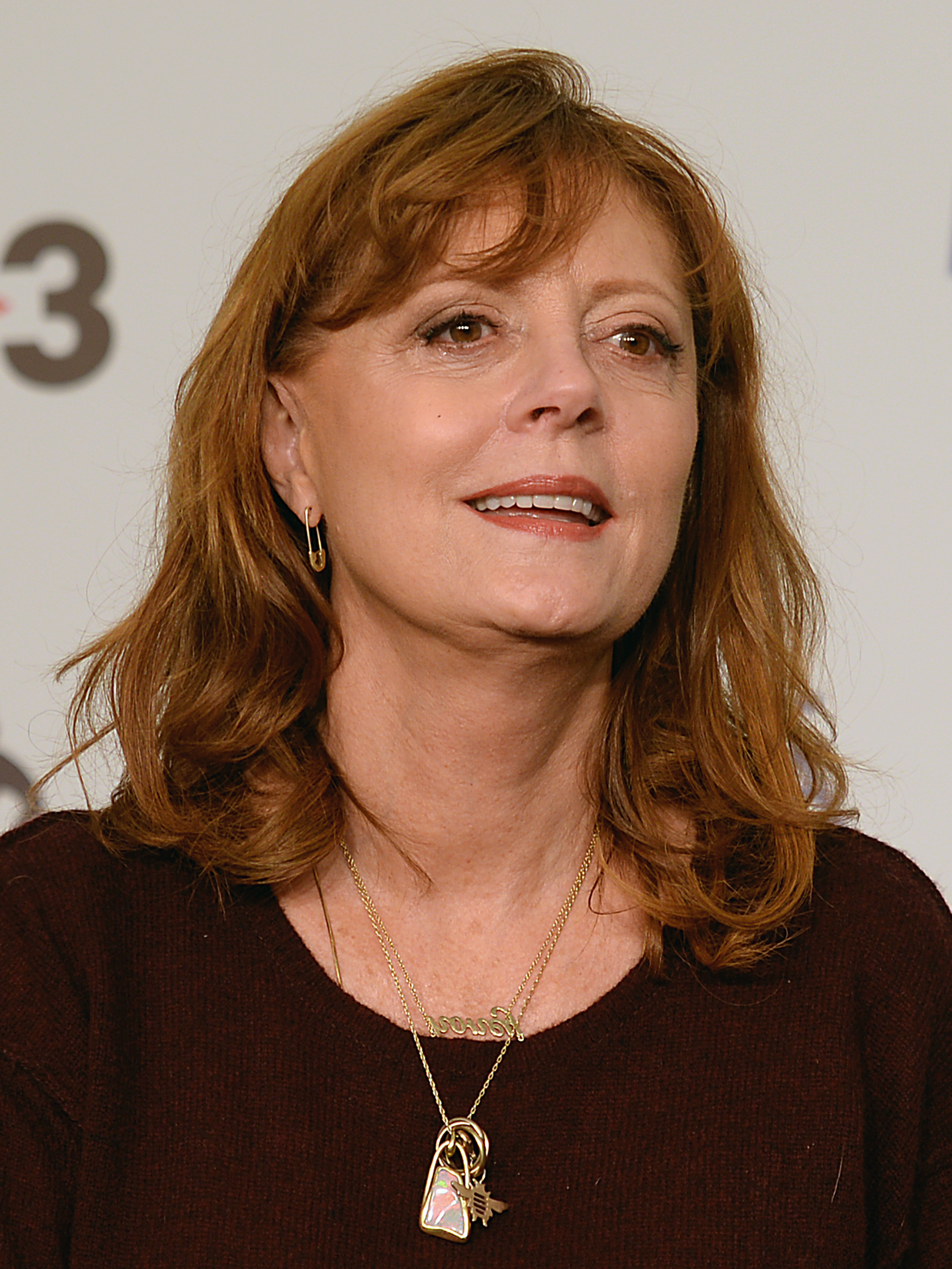 Susan Sarandon, fotografiada durant el Festival Internacional de Cinema Fantàstic de Catalunya (Sitges, 2017)